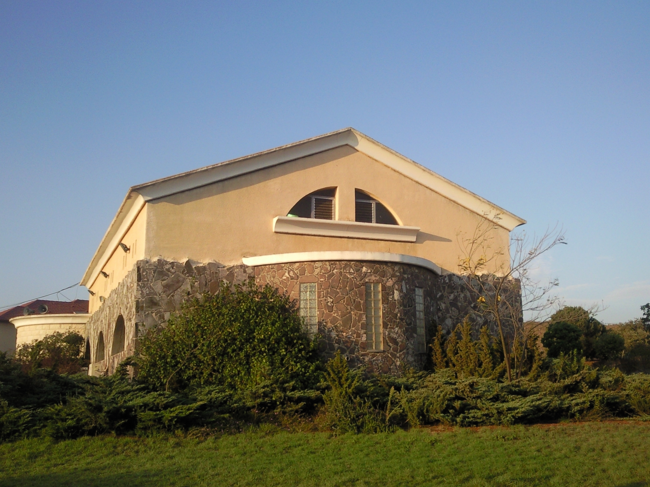 בית המדרש של המכינה הקדם צבאית קשת יהודה